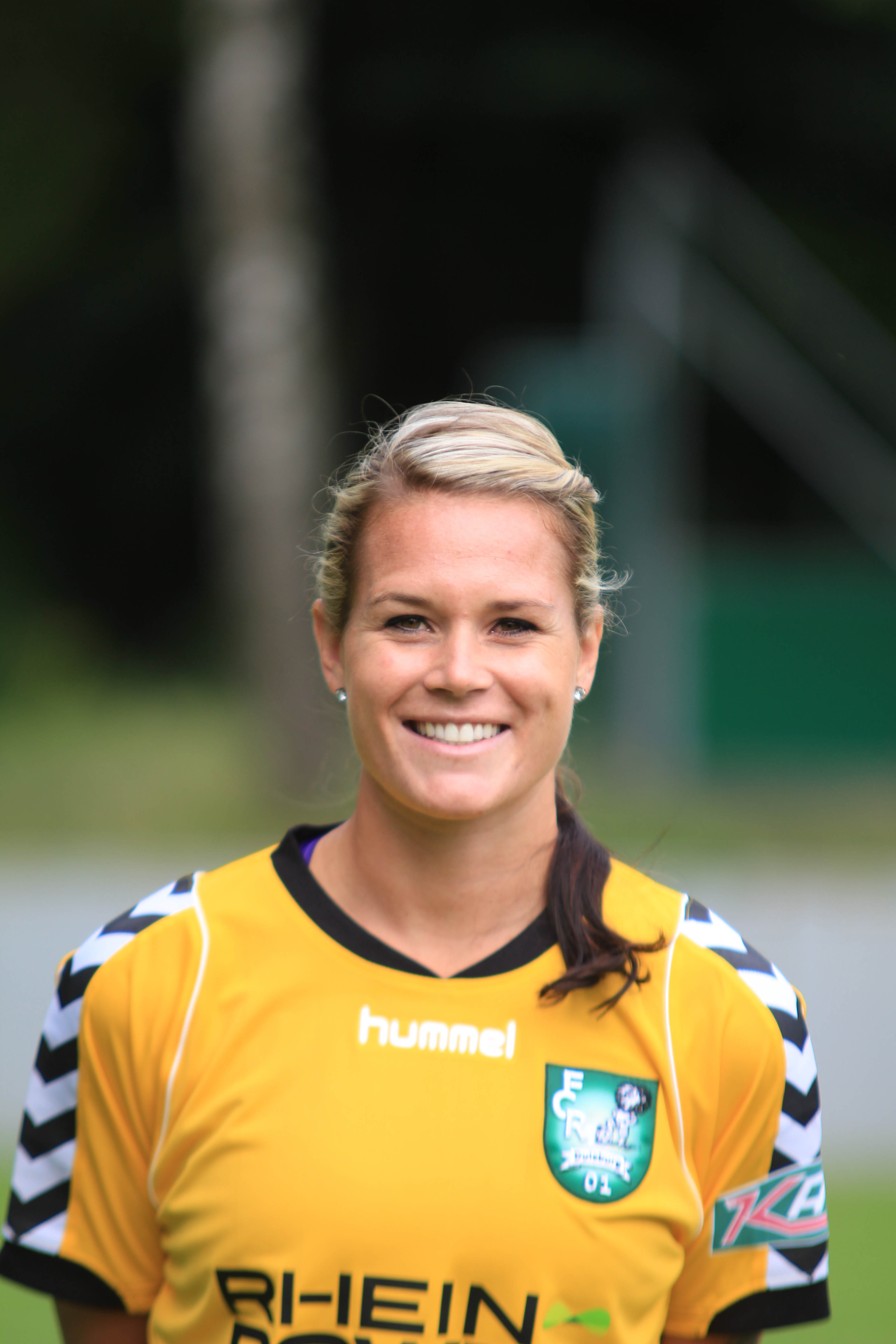 Ashlyn Harris, FCR 2001 Duisburg